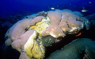 Siderastrea siderea en Flower Garden Banks